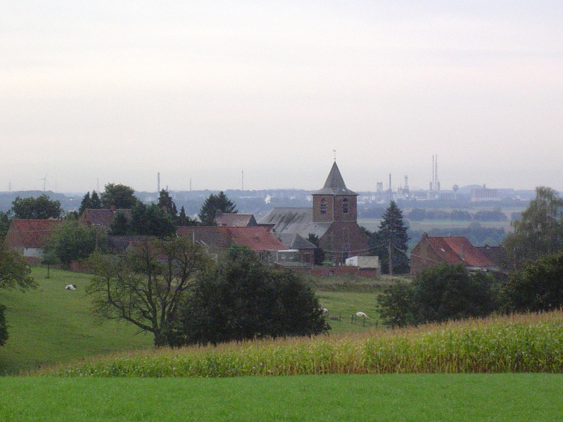 Henripont vu depuis le Chemin aux loups, en bordure du Bois de la Houssière.